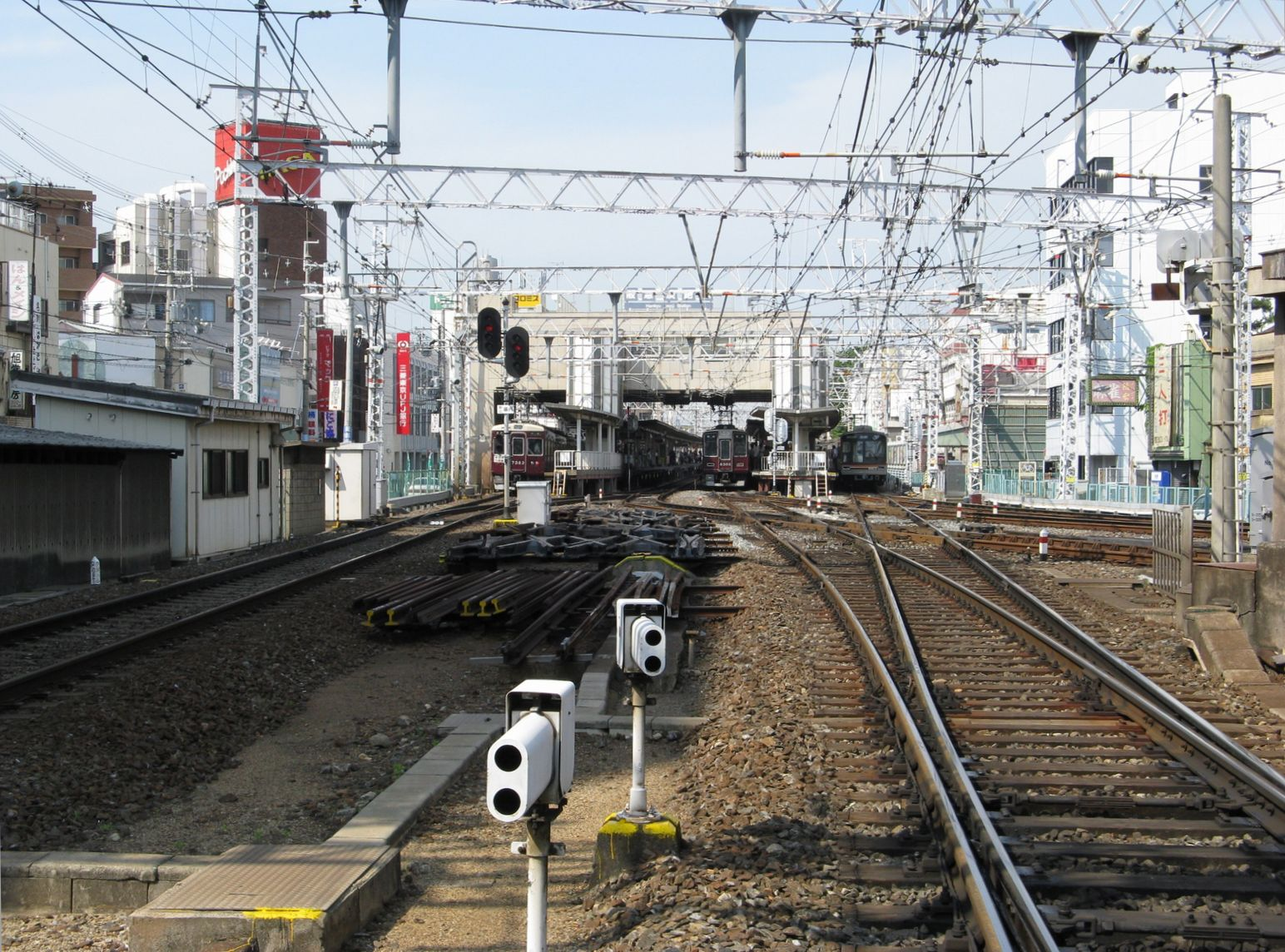 淡路駅構内を東望